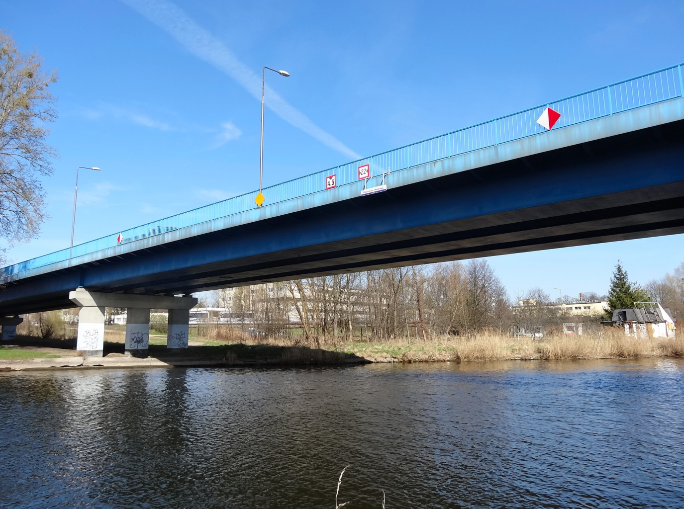 Most Kazimierza Wielkiego w Bydgoszczy nad rzeką Brdą